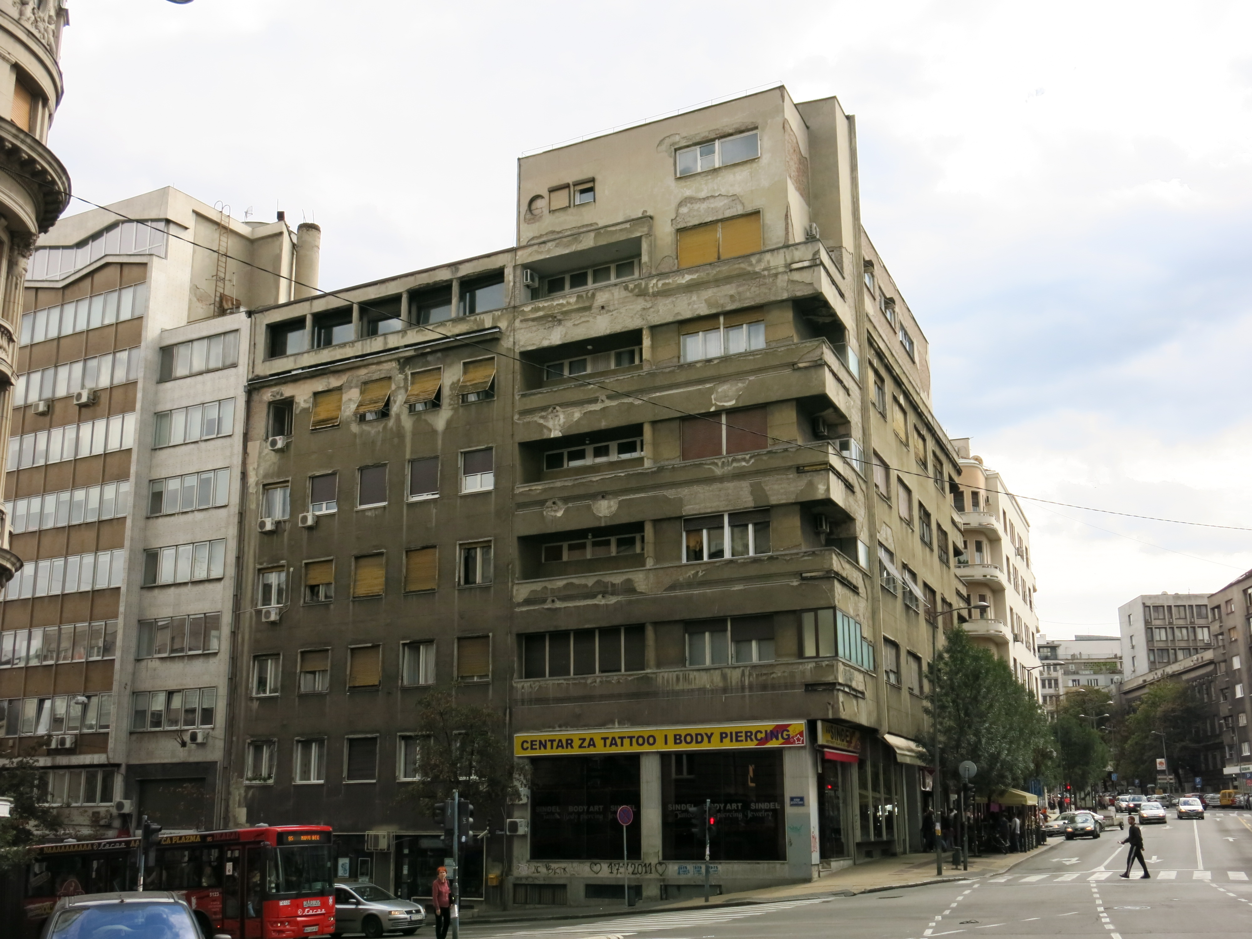 Зграда Пензионог фонда Беочинске фабрике цемента у Београду